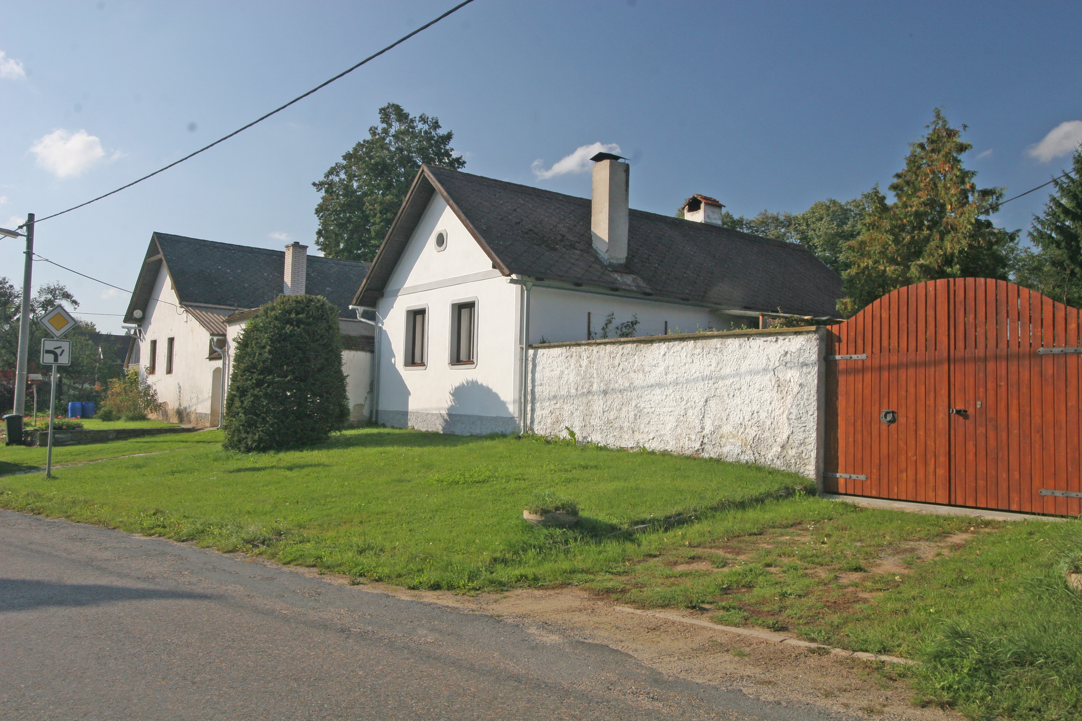 Nový Petřín čp. 11